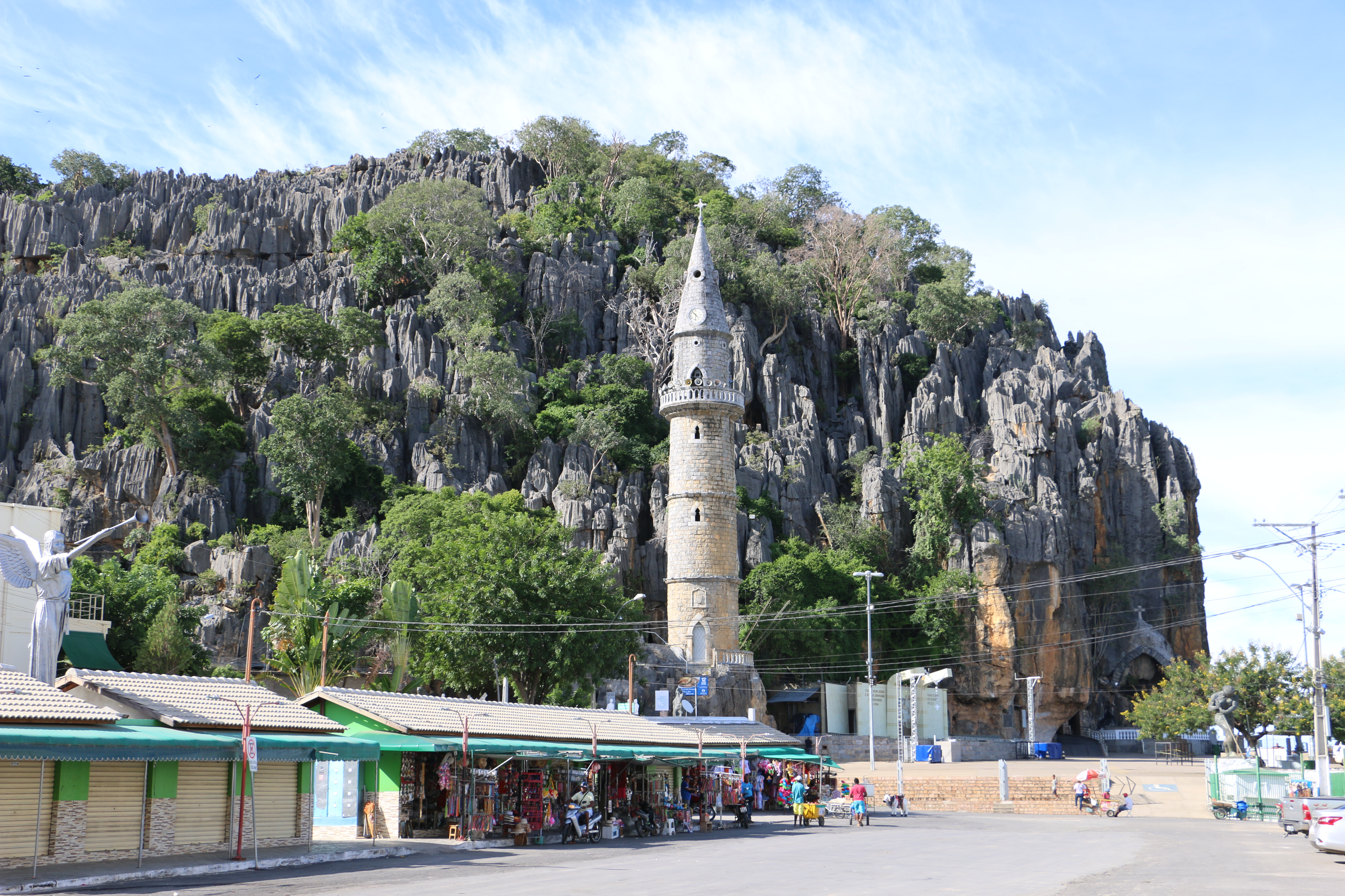 Santuário Cristocêntrico e Mariano, dedicado ao Bom Jesus da Lapa e a Senhora da Soledade, fundado em 1691, por um português, Francisco de Mendonça Mar (Pe. Francisco da Soledade), atualmente administrado pelos Missionários Redentoristas. Lugar de romaria católica que acolhe quase três milhões de romeiros durante o ano. Templo diferenciado por ser dentro de uma grande pedra. Tem várias grutas dedicadas aos Santos, tendo duas principais para as celebrações eucarísticas.